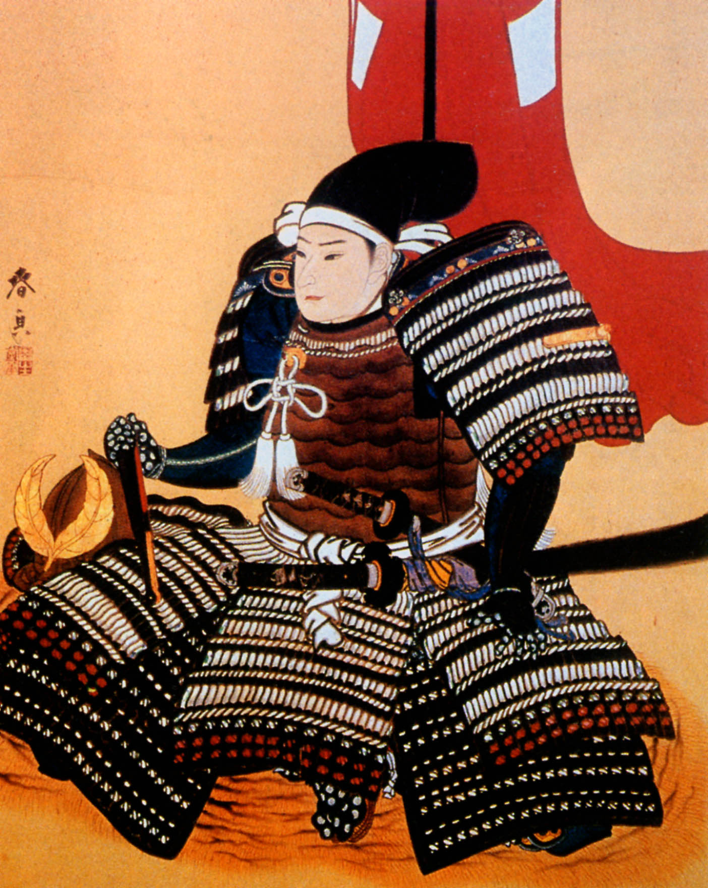 肖像画 松平容保 Matudaira Katamori